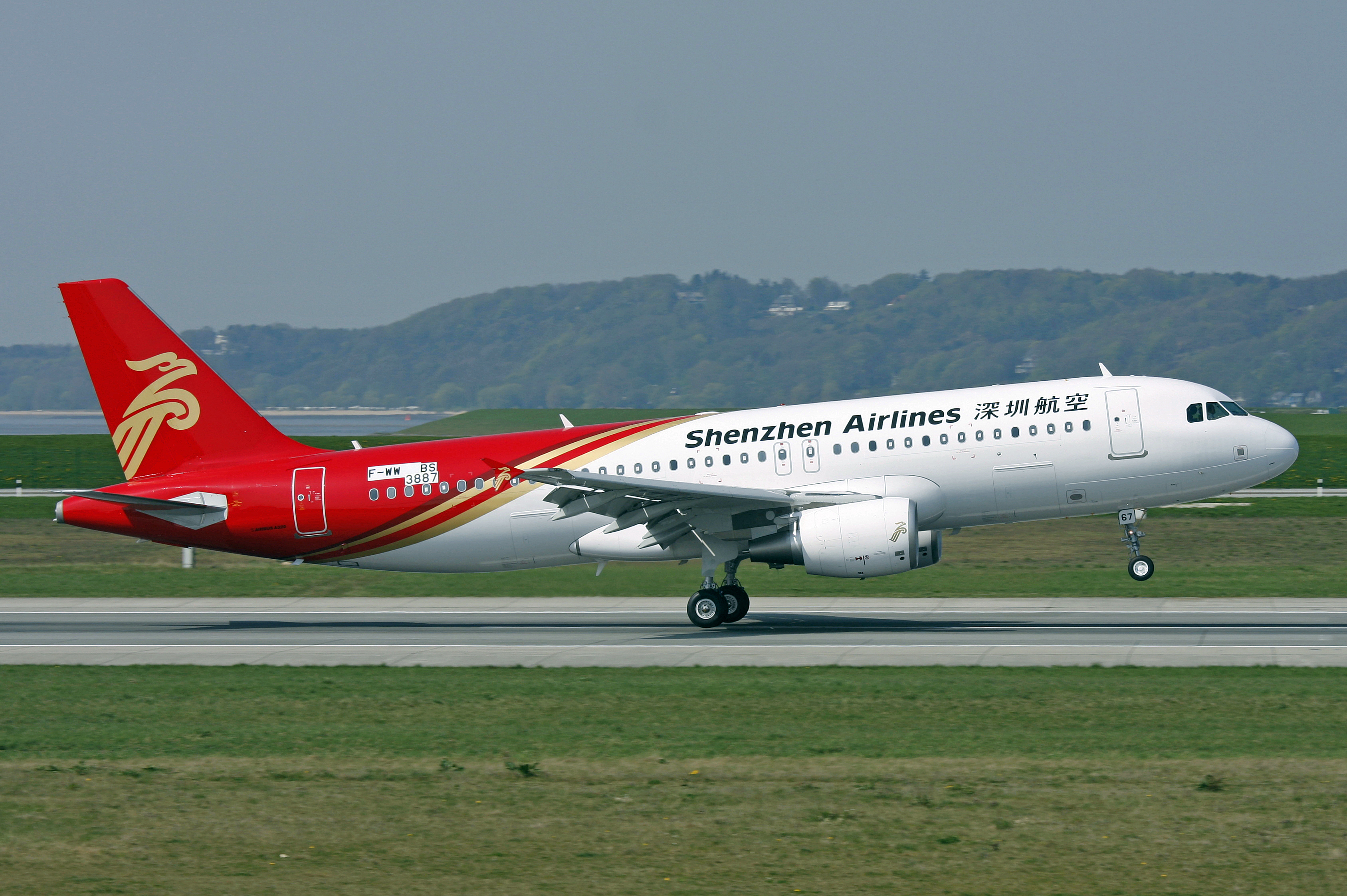 14-04-09 Finkenwerder